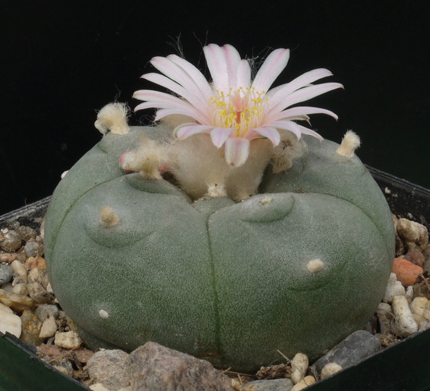 Lophophora williamsii in Blüte.